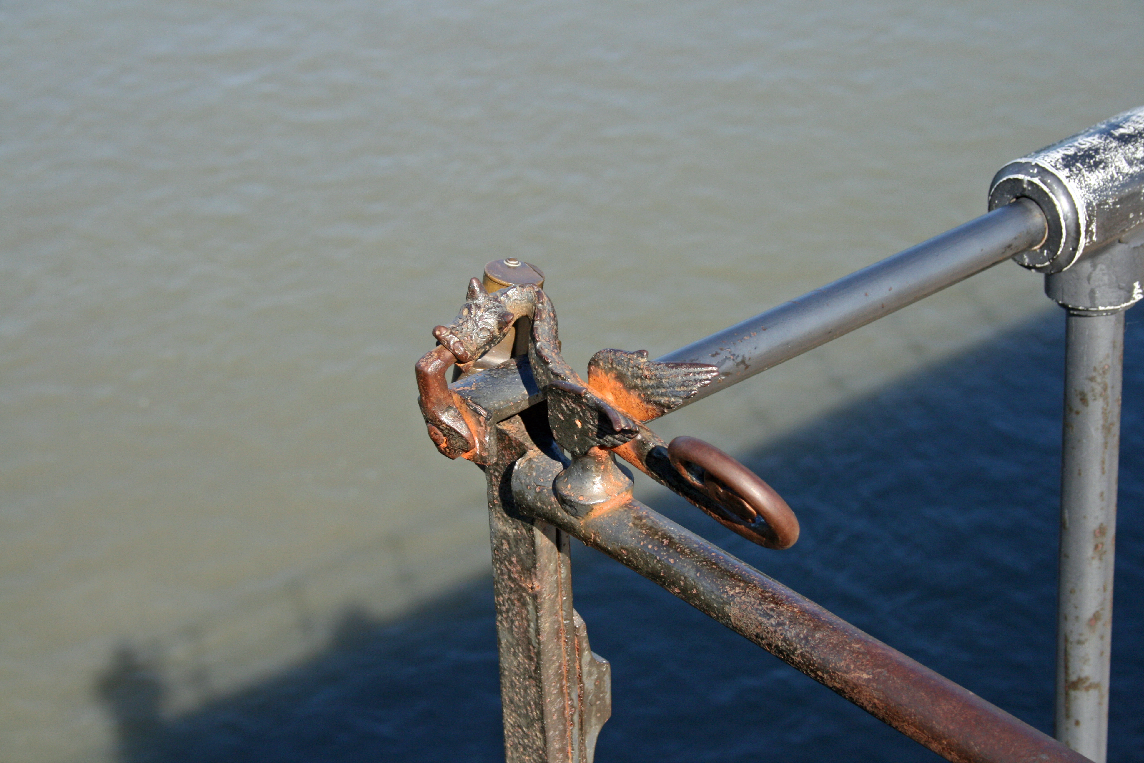 Drac en fer forgé sur la rambarde du Pont Saint-Bénézet à Avignon